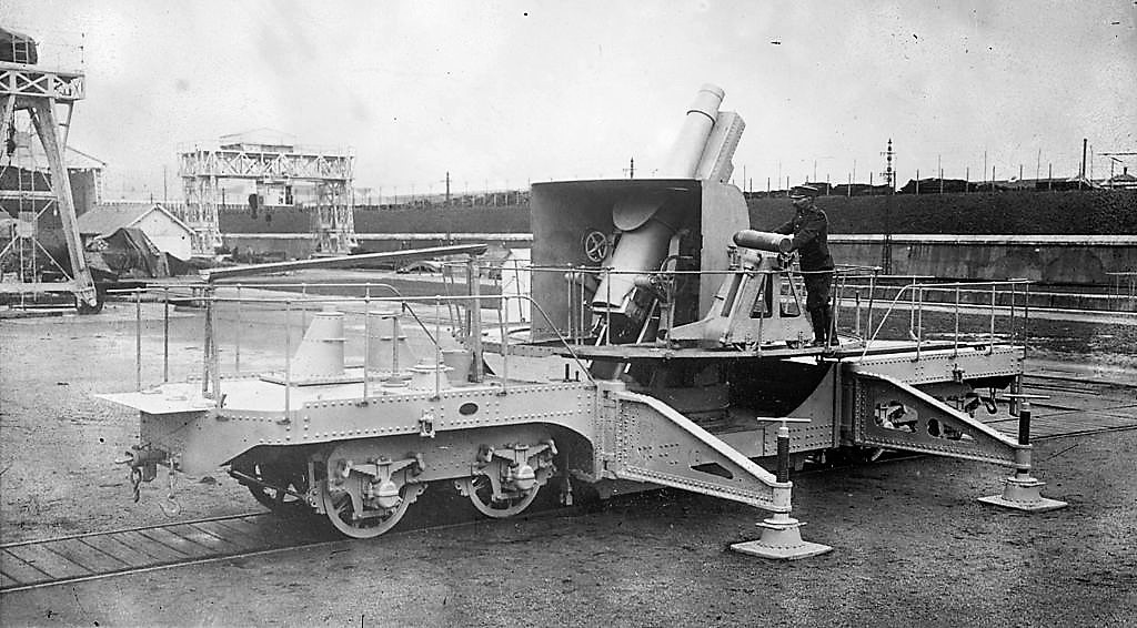 Schneider Rapid Fire 20 cm. Howitzer on Railway Carriage